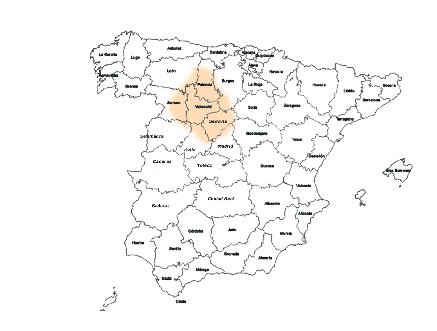 Primer esbozo de los vacceos, poco a poco se irá perfeccionando con el mismo nombre de archivo.